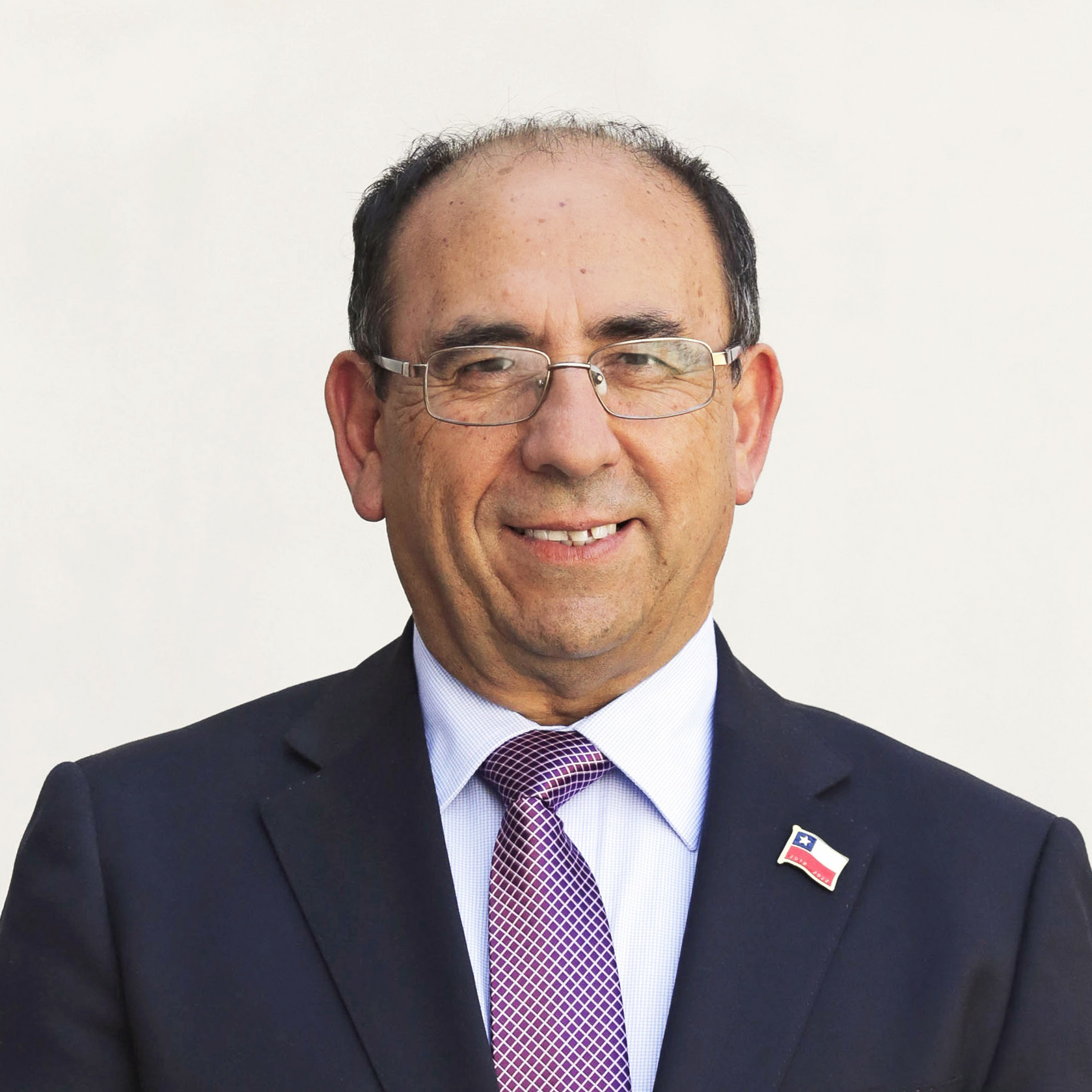 Foto oficial de Claudio Rodríguez